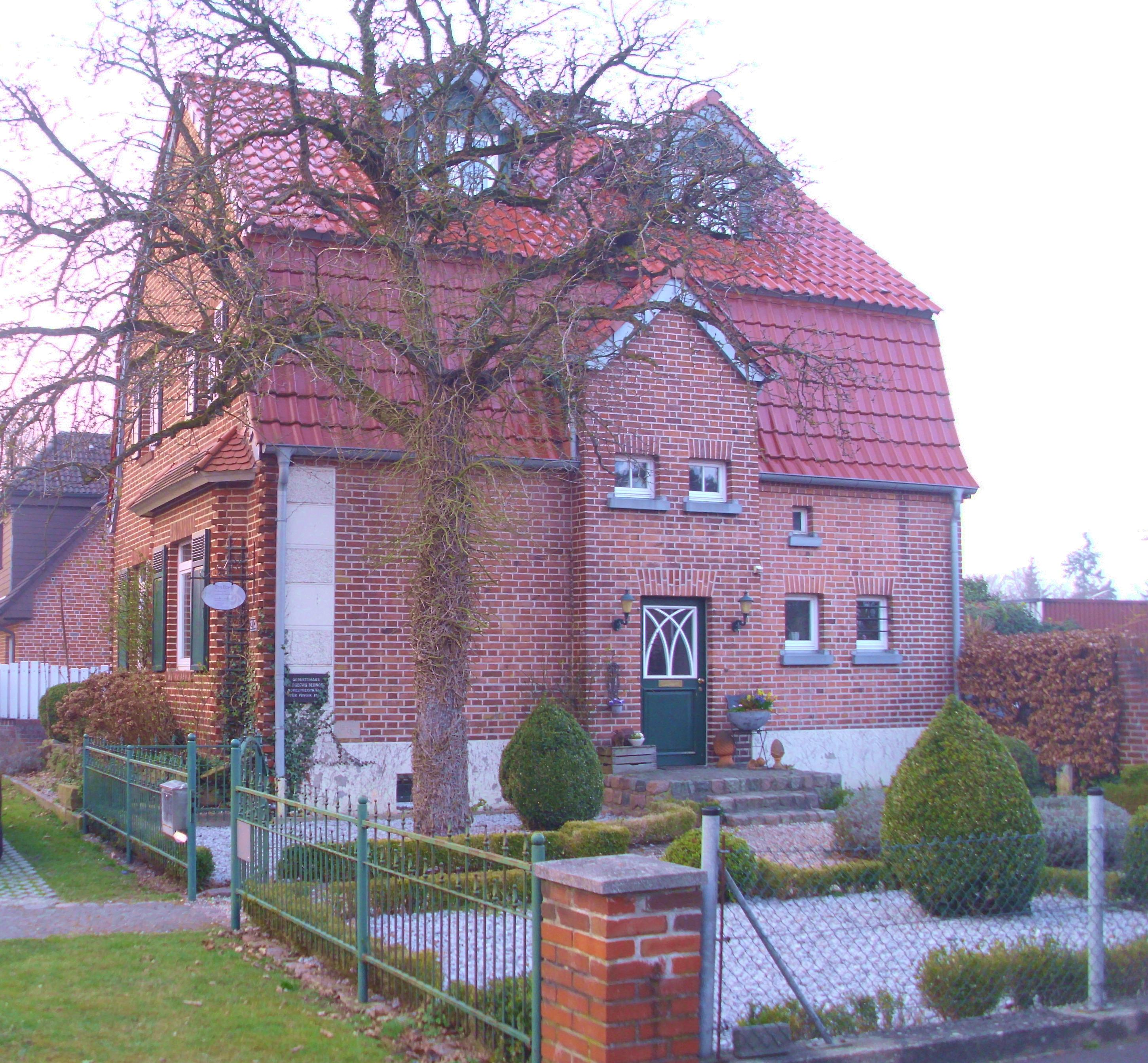 Geburtshaus von Georg Bednorz (Physik-Nobelpreis-Träger 1987) in Neuenkirchen (Kreis Steinfurt)